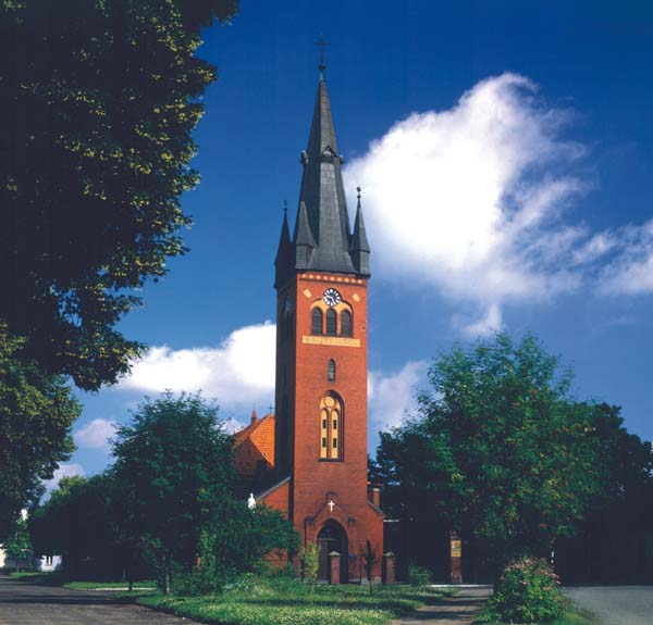 Kościół Parafialny w Trzcielu